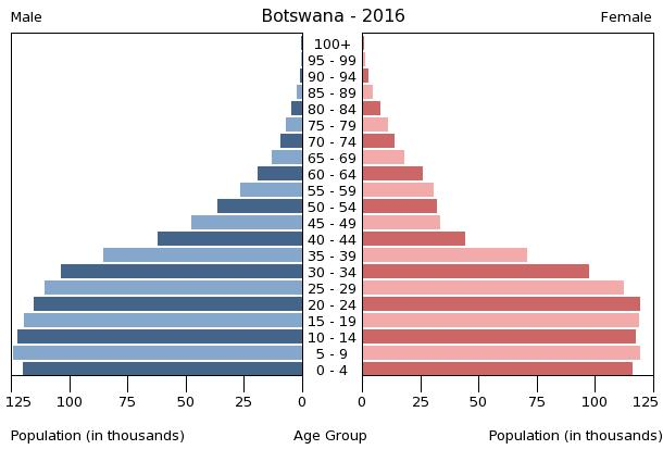 A population pyramid illustrates the age and sex structure of a country's population and may provide insights about political and social stability, as well as economic development. The population is distributed along the horizontal axis, with males shown on the left and females on the right. The male and female populations are broken down into 5-year age groups represented as horizontal bars along the vertical axis, with the youngest age groups at the bottom and the oldest at the top. The shape of the population pyramid gradually evolves over time based on fertility, mortality, and international migration trends.